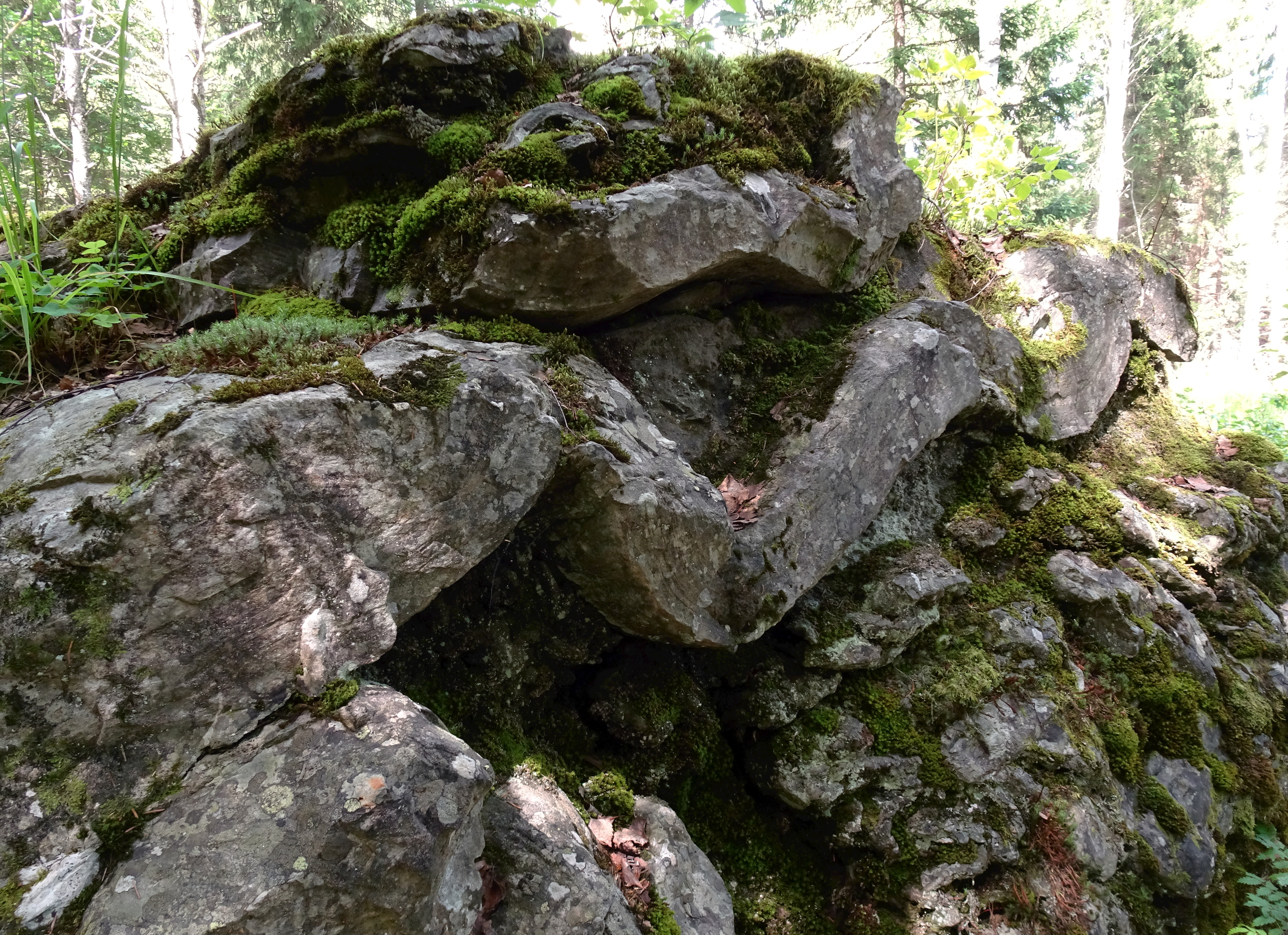 Bråfallsstenen i Jätturns naturreservat